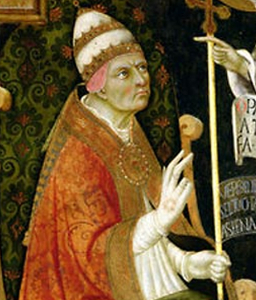 La vergine raccomanda siena a papa callisto III